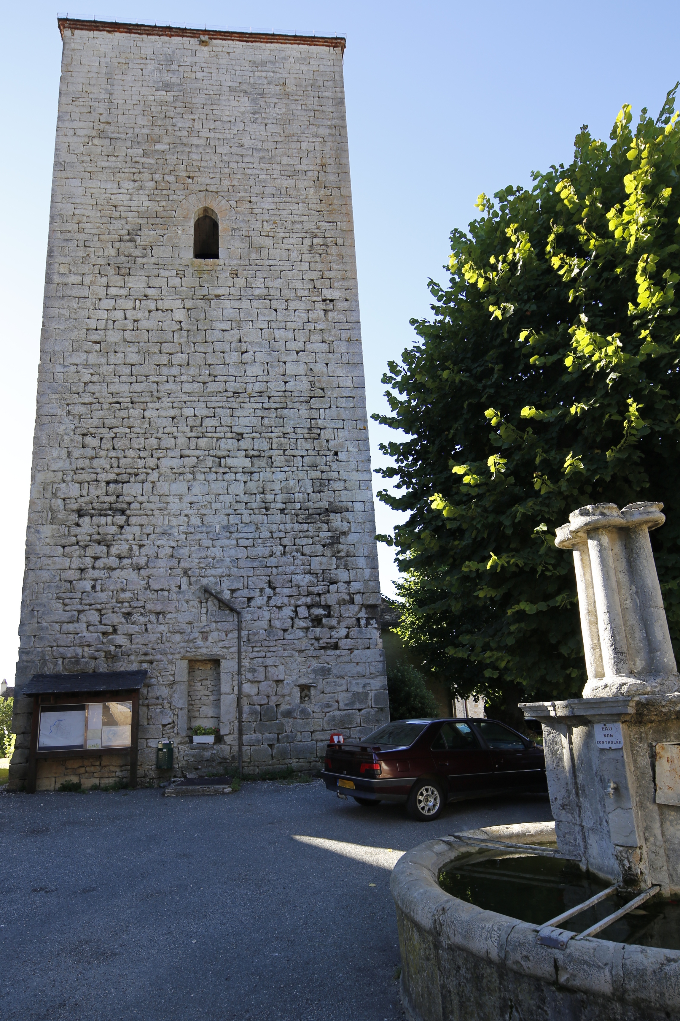 Tour de Floirac.